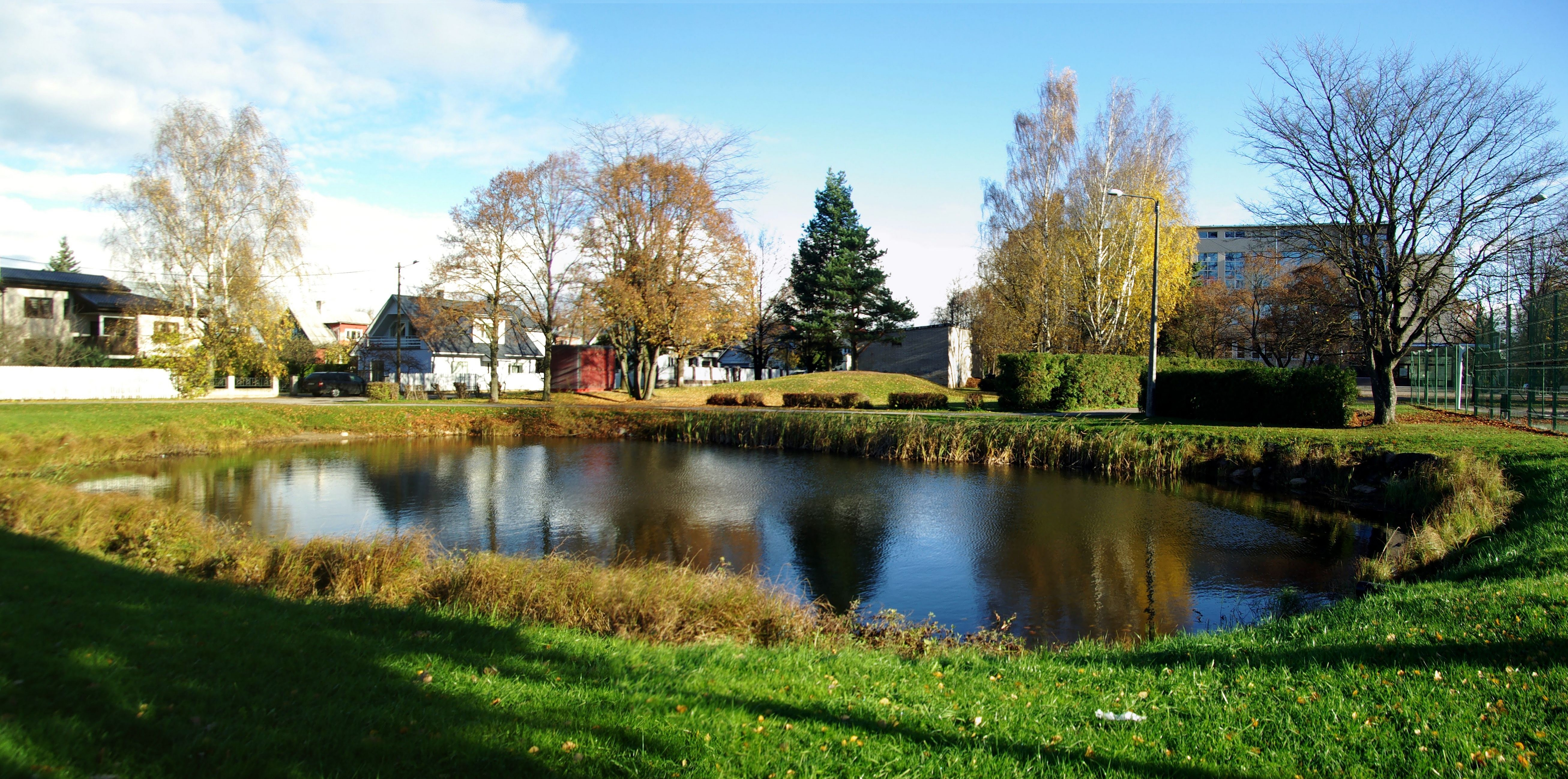 Tartu,Tamme gümnaasiumi taga